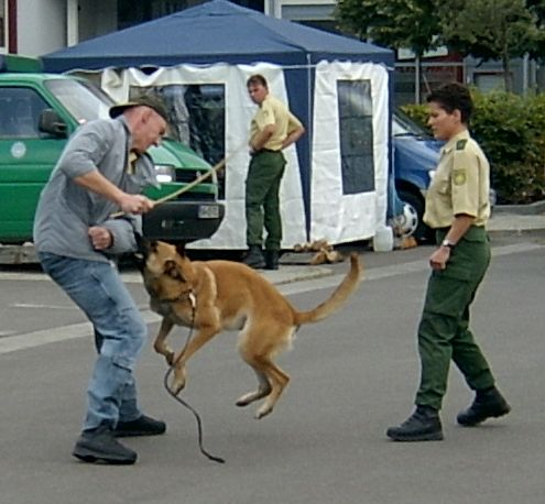 Polizeihund beim Stellen eines (theoretischen) Täters.